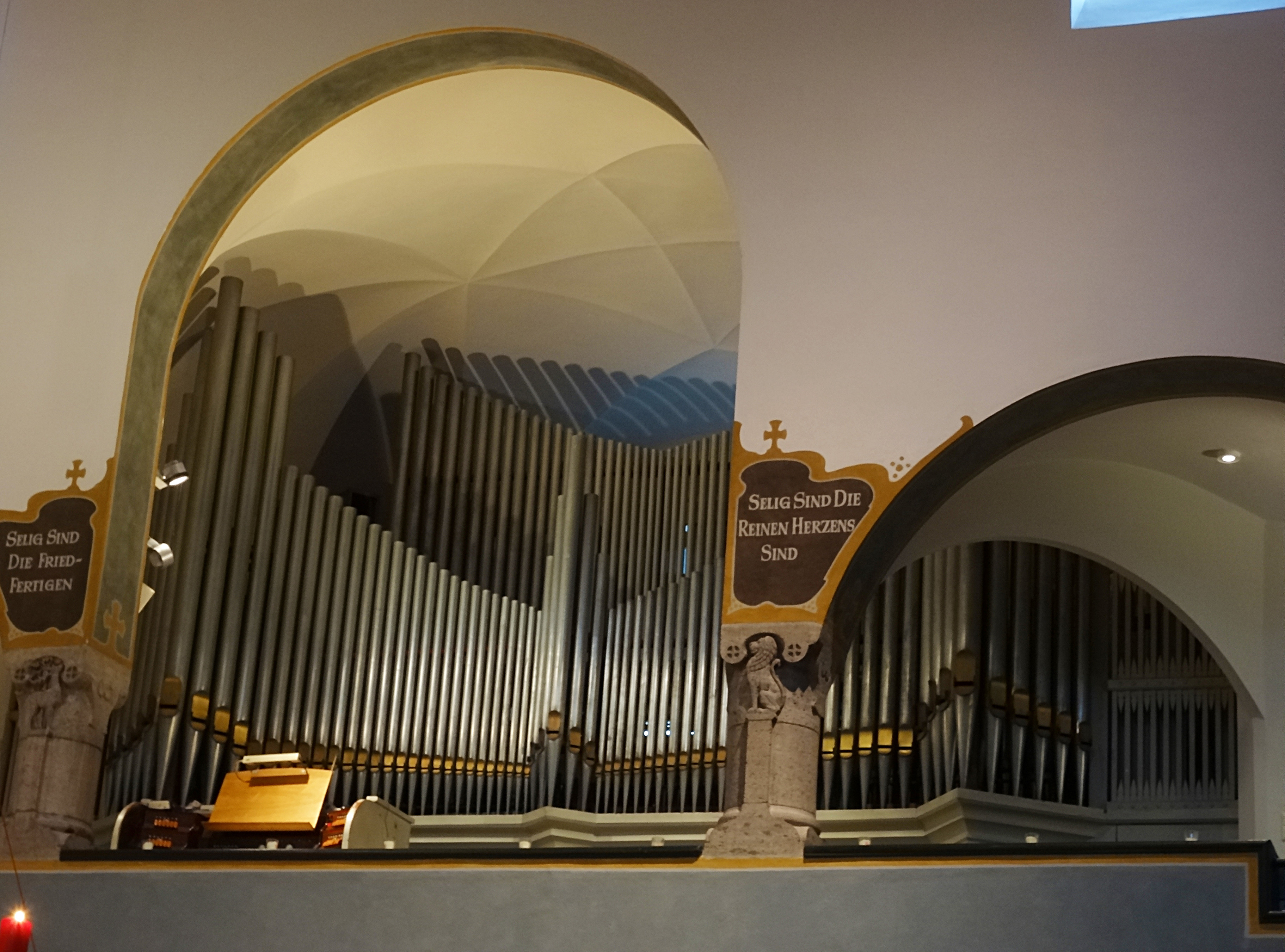 Südemporenorgel von Steinmeyer (1901)